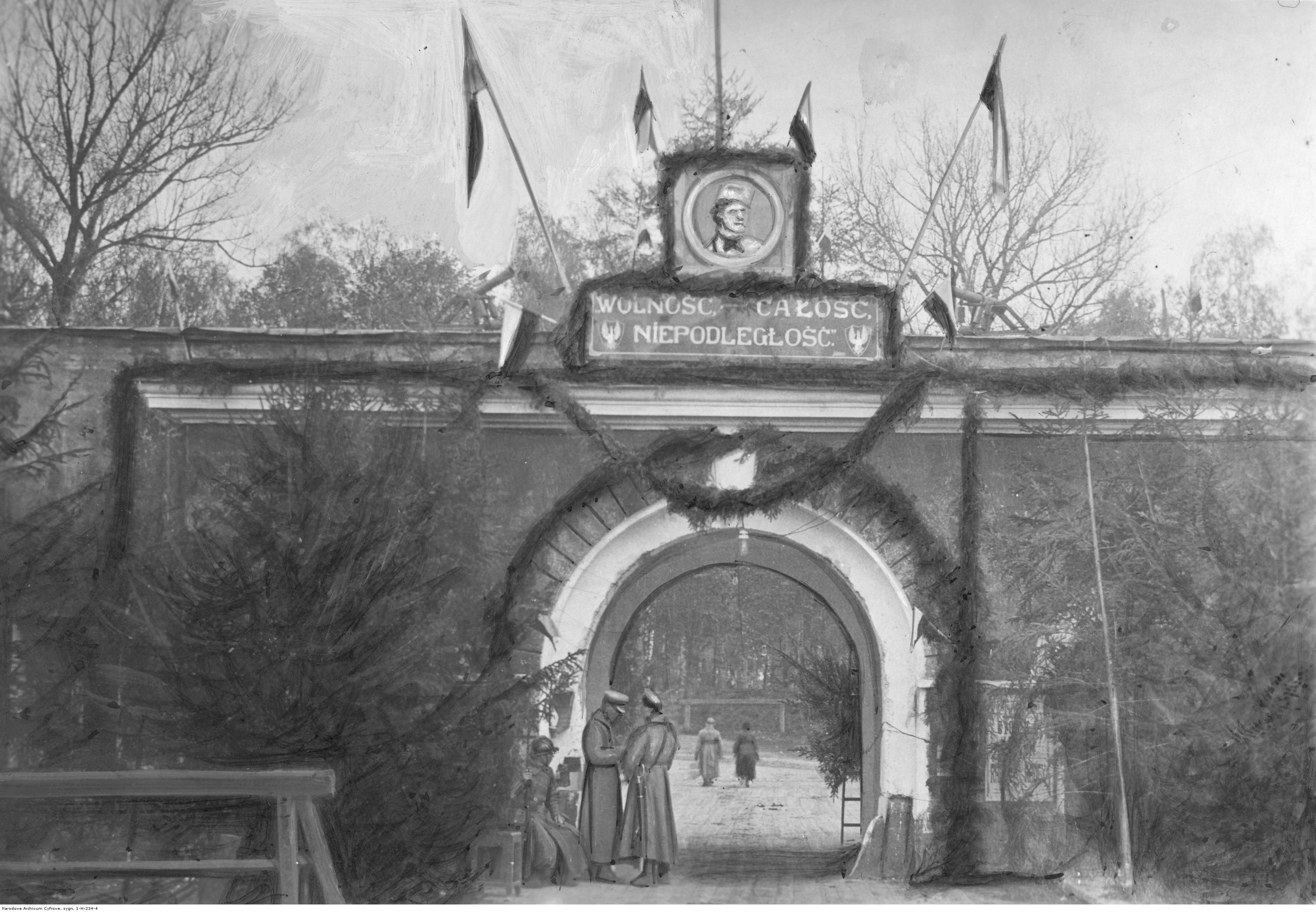 I Korpus Polski w Rosji - uroczystość Święta 3 Maja - udekorowana brama wiodąca do twierdzy Bobrujsk; 1918 r. Koncern Ilustrowany Kurier Codzienny - Archiwum Ilustracji Sygnatura: 1-H-234-4